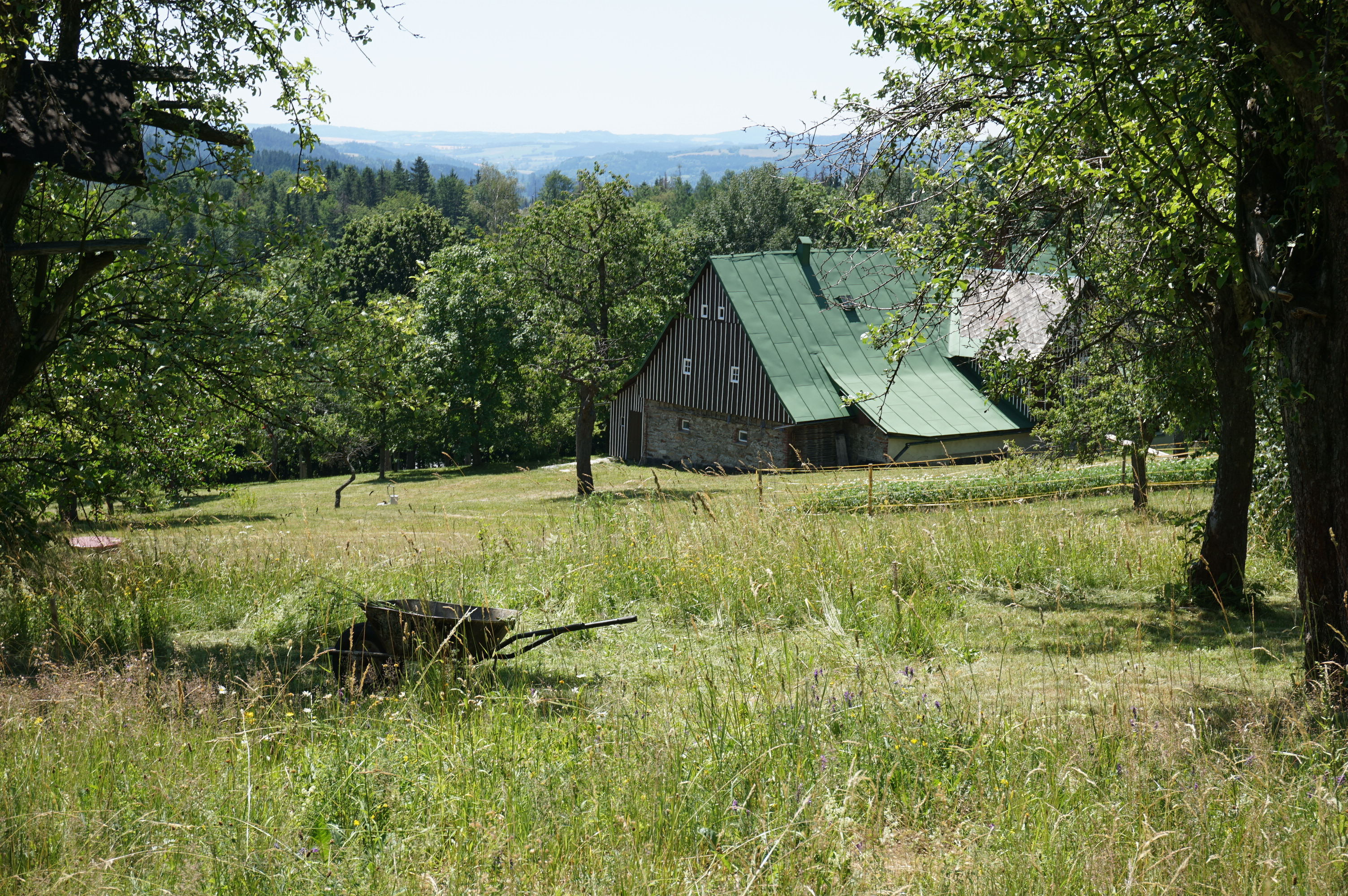 Končiny (u Jablonce nad Jizerou) - čp. 56